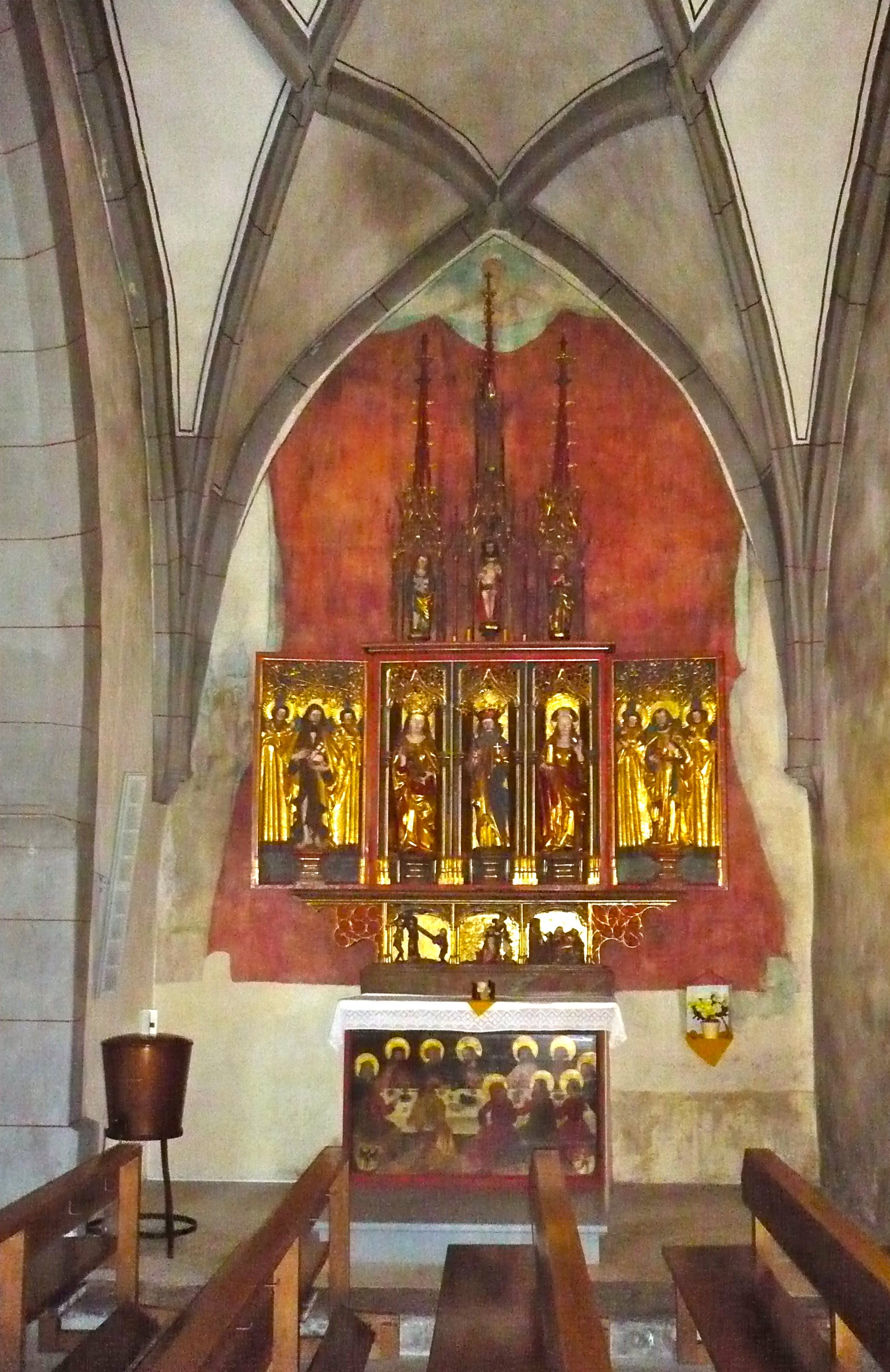 Kirche St. Maria und Michael in Churwalden, Luziusaltar